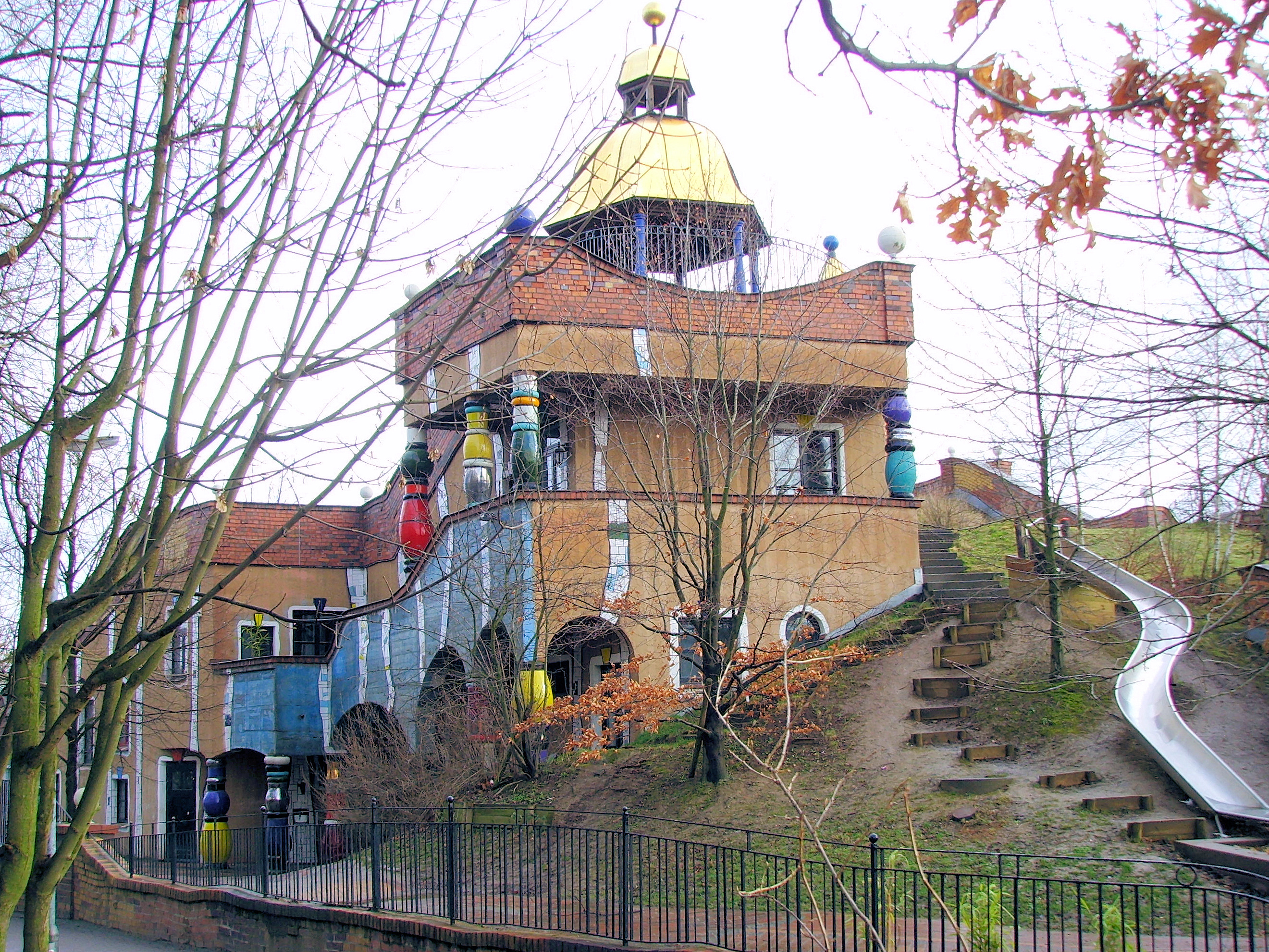 Municipal Kindergarten in Frankfurt am Main-Heddernheim, projected by Friedensreich Hundertwasser: entrance (left) and northwestern "tower"